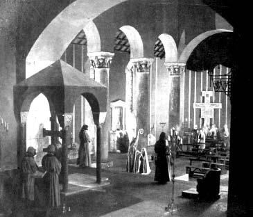 Fotogramma del film muto Frate Francesco, regia Giulio Antamoro (1877-1945), produz ICSA Firenze Rifredi, 1926